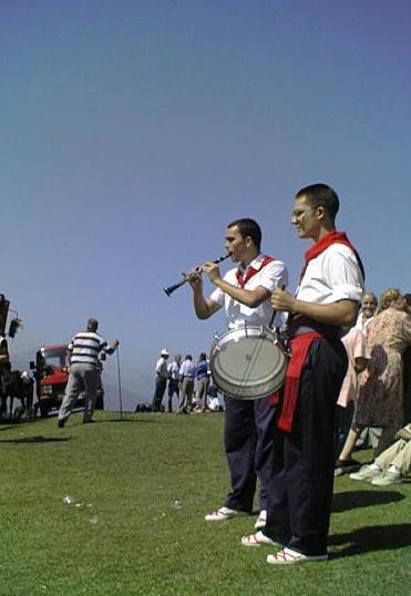 groupe folkorique en Cantabrie (espagne). Virgen del Moral (1er samedi après le 15 aout). Caisse claire et clarinette Mib (système de clefs limité). Catégorie:clarinette catégorie:Espagne Catégorie:cantabrie